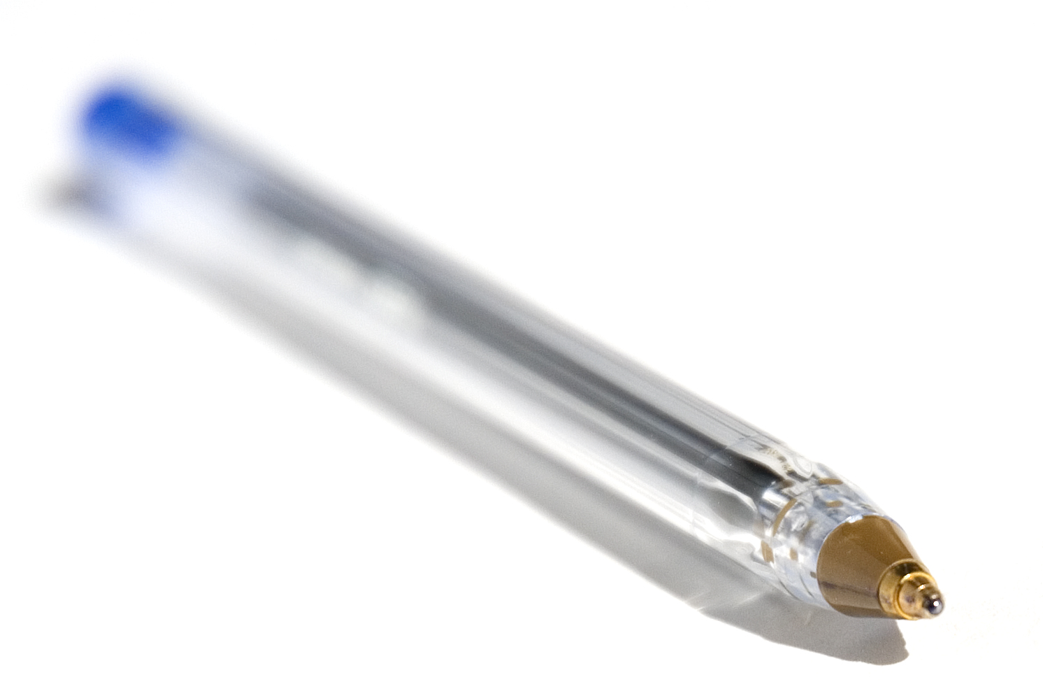 A Bic Cristal pen